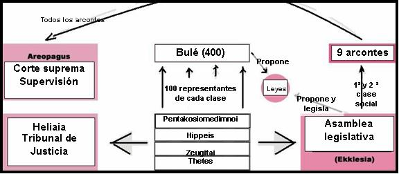 Solón es el autor de la Constitución Ateniense del año 594 a.C.